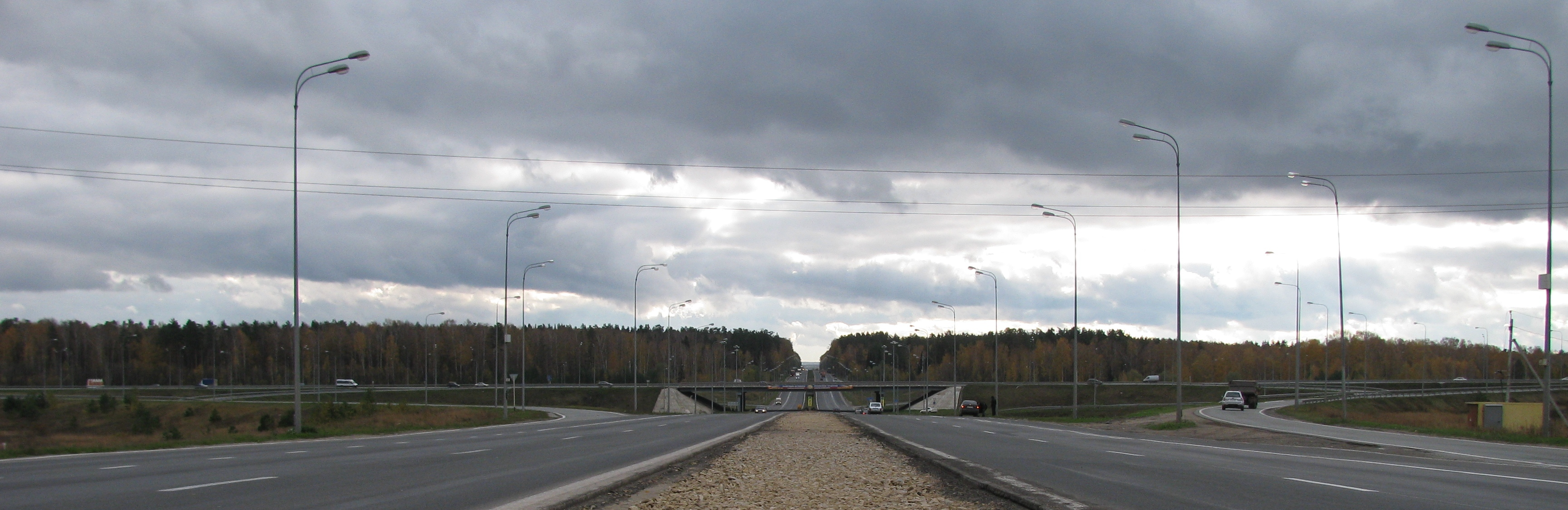 Восточная эстакада